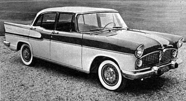 Simca Vedette Chambord (1961)